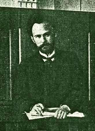 Председатель Петербургского совета рабочих депутатов Георгий Хрусталёв-Носарь (1877-1919)